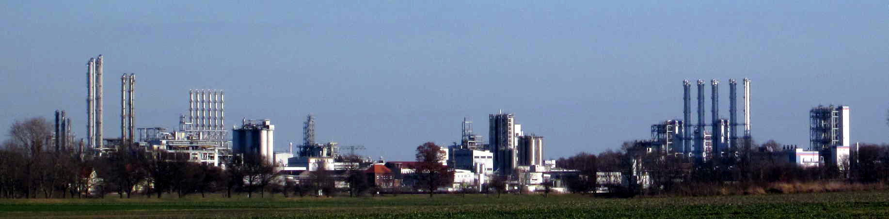 Nünchritz